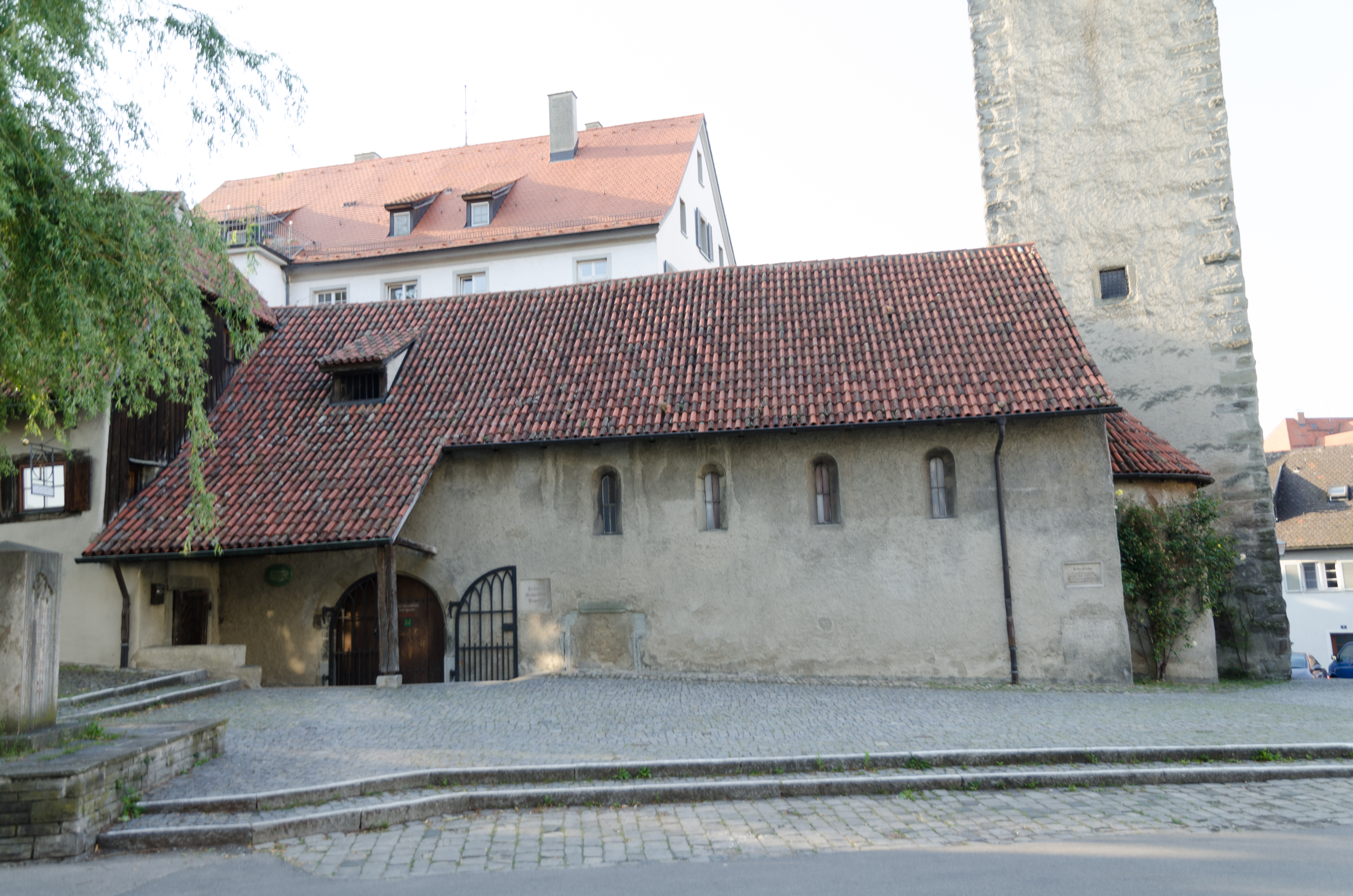 Lindau, St. Peter